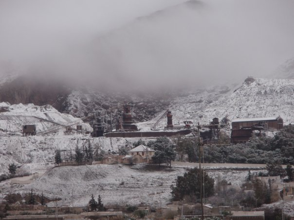 vue sur la mine de jerissa